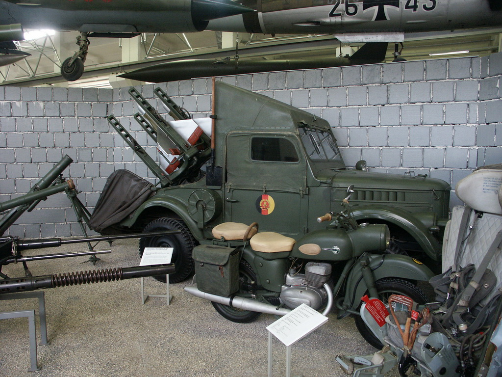 Bundeswehrmuseum Dresden mit Teilen von der NVA Remark: 2P26 anti-tank vehicle (3M6 Shmel / AT-1 Snapper missile launcher mounted on GAZ-69).